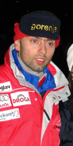 Damjan Fras